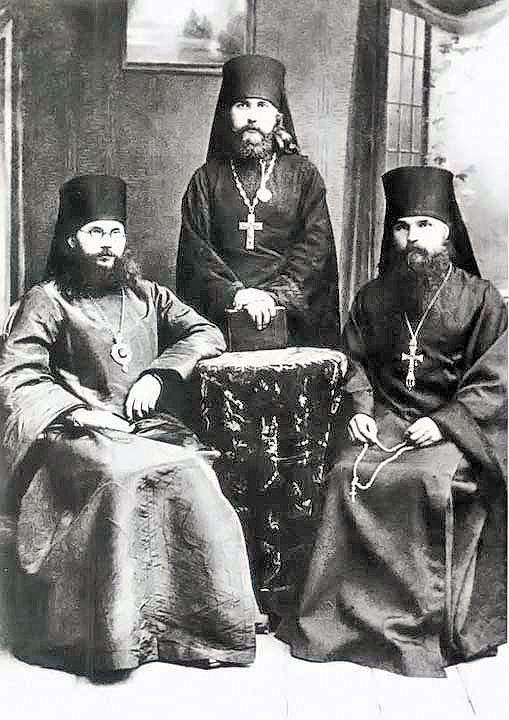 Епископ Волоколамский Феодор (Поздеевский), иеромонах Герасим (Садковский), архимандрит Герман (Ряшенцев), 1916 год, Сергиев Посад.